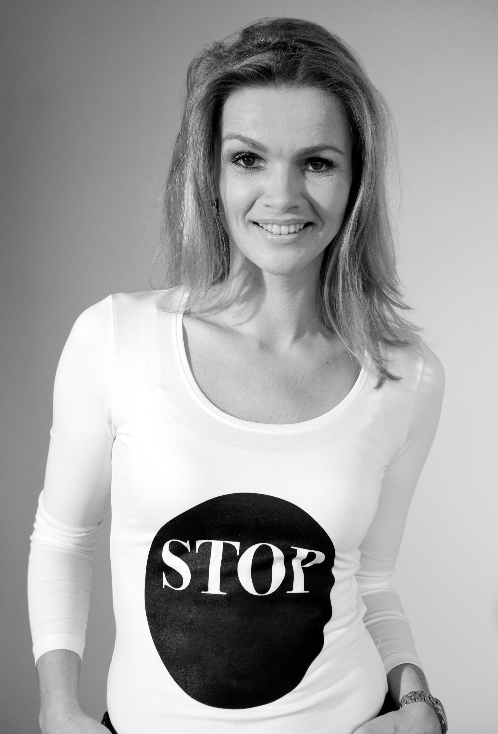 Tooske Ragas is vanaf maart 2013ambassadeur van Stichting DON.